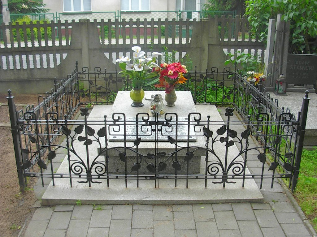 Cmentarz św. Jana Bydgoszcz - mogiła rozstrzelanych 2 X 1939 r. na rynku w starym Fordonie